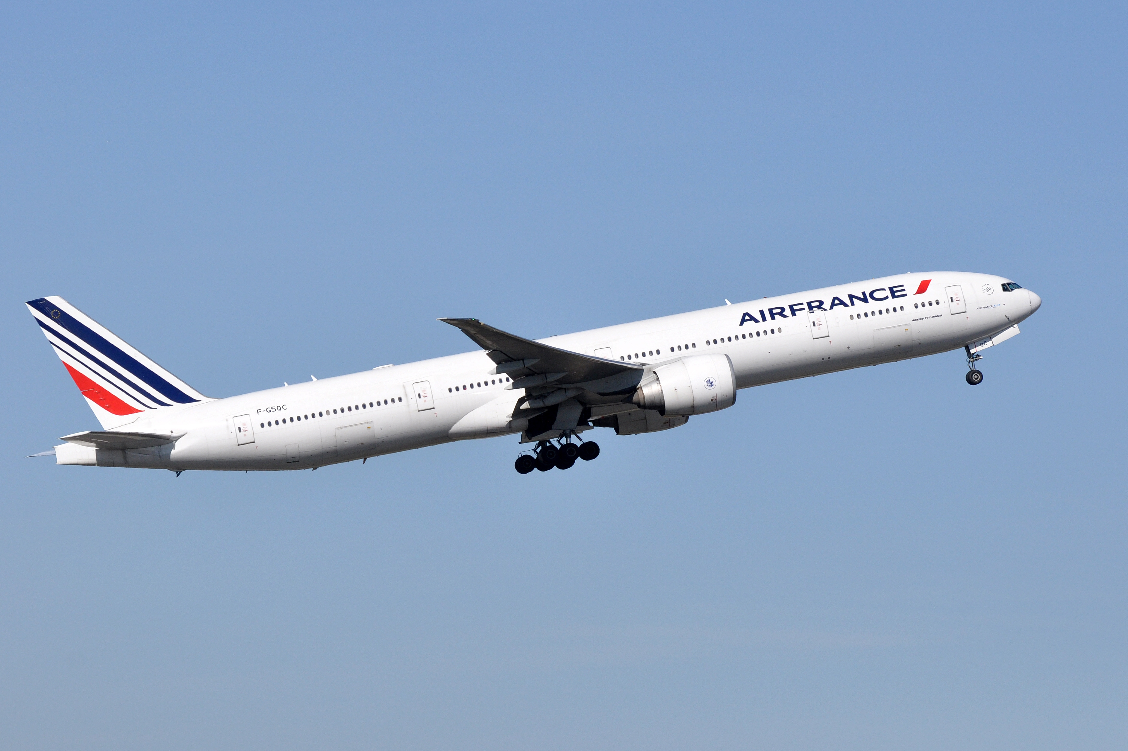 MSN 32727 LN 480 B777-328ER AIR FRANCE CDG AIRPORT